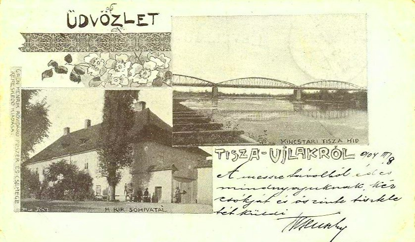 Képes levelezőlap Tisza-Újlakról